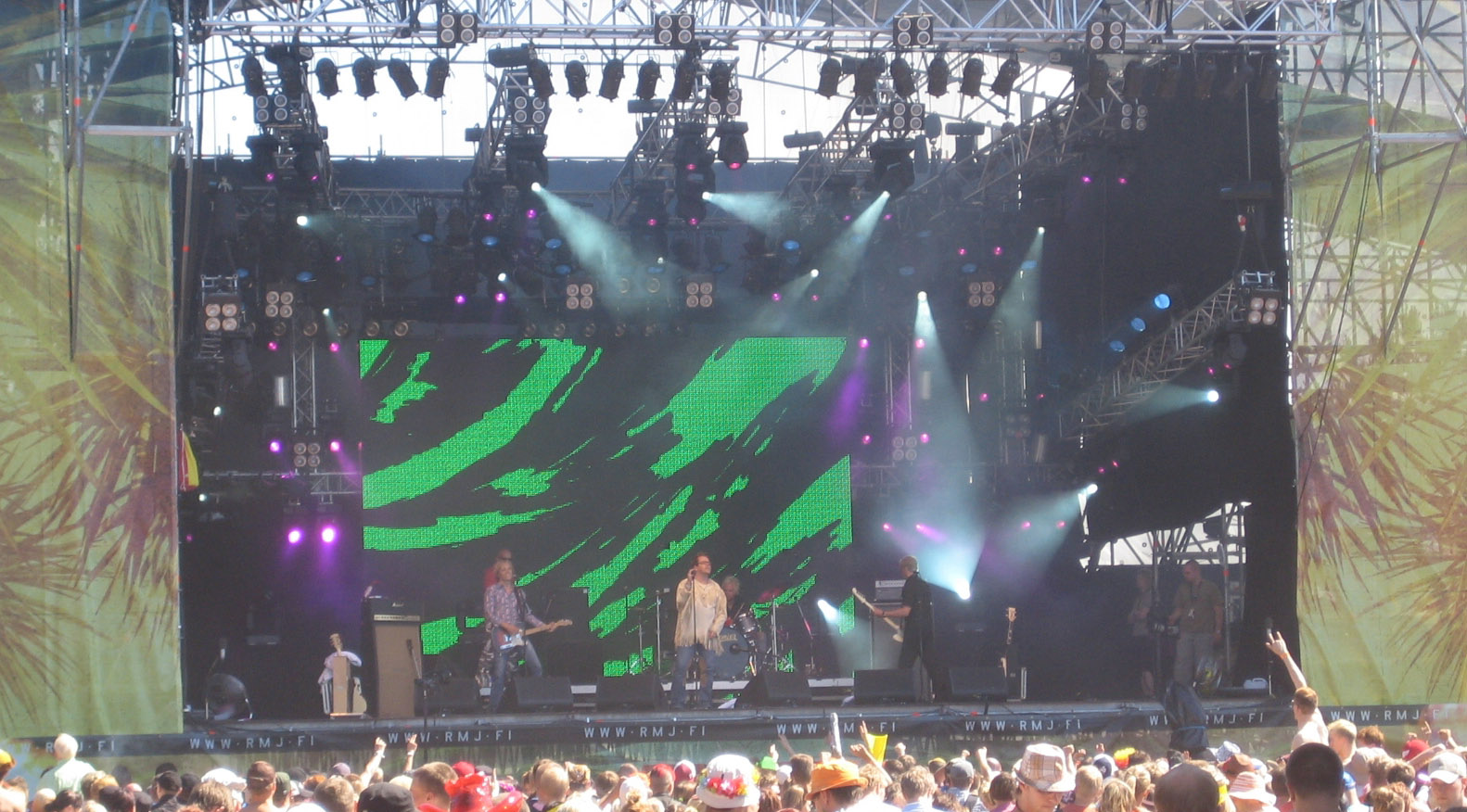 Dingo, Raumanmeren juhannus 2006, Finland.